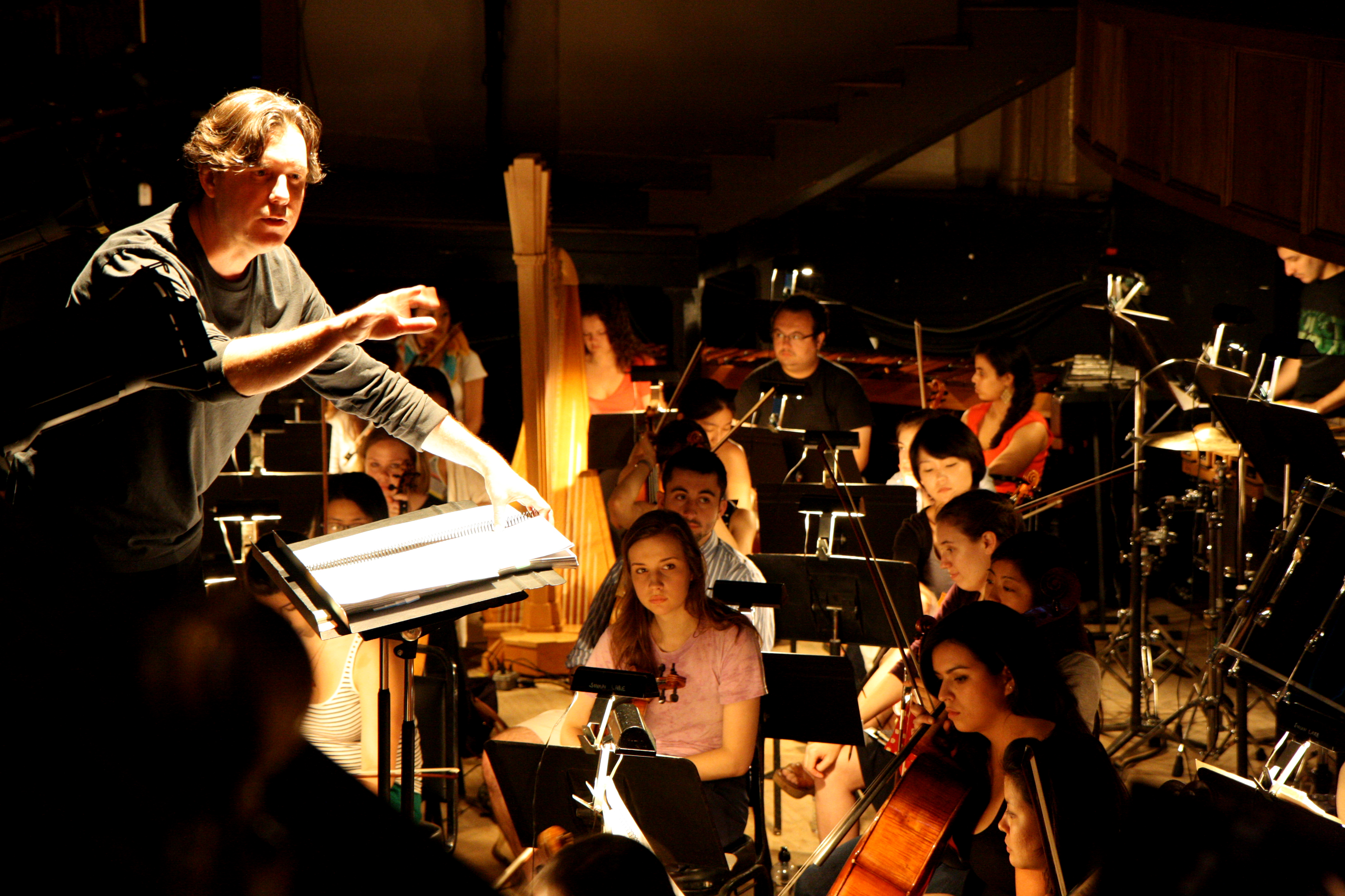 Le chef d'orchestre John Kennedy lors des répétitions pour la première américaine de Kepler en mai 2012